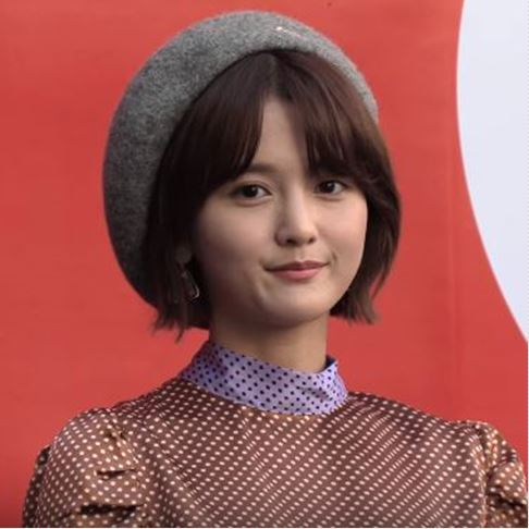 10월 20일 오전 서울 중구 동대문디자인플라자(DDP)에서 열린 2019 S/S 헤라 서울패션위크 랭앤루(LANG&LU) 포토월에 참석한 남보라